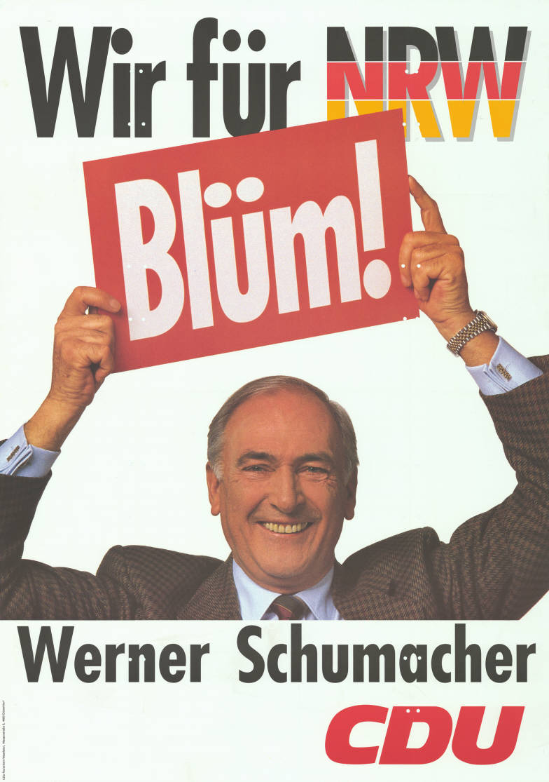 Wir für NRW Blüm! Werner Schumacher CDU Abbildung: Porträtfoto mit hochgehobenem Namensschild "Blüm!" - Nationalfarben Plakatart: Kandidaten/Personenplakat mit Auftraggeber: CDU Nordrhein-Westfalen, Düsseldorf Objekt-Signatur: 10-009 : 1129 Bestand: Landtagswahlplakate Nordrhein-Westfalen (10-009) GliederungBestand10-18: Landtagswahlplakate Nordrhein-Westfalen (10-009) » CDU Lizenz: KAS/ACDP 10-009 : 1129 CC-BY-SA 3.0 DE